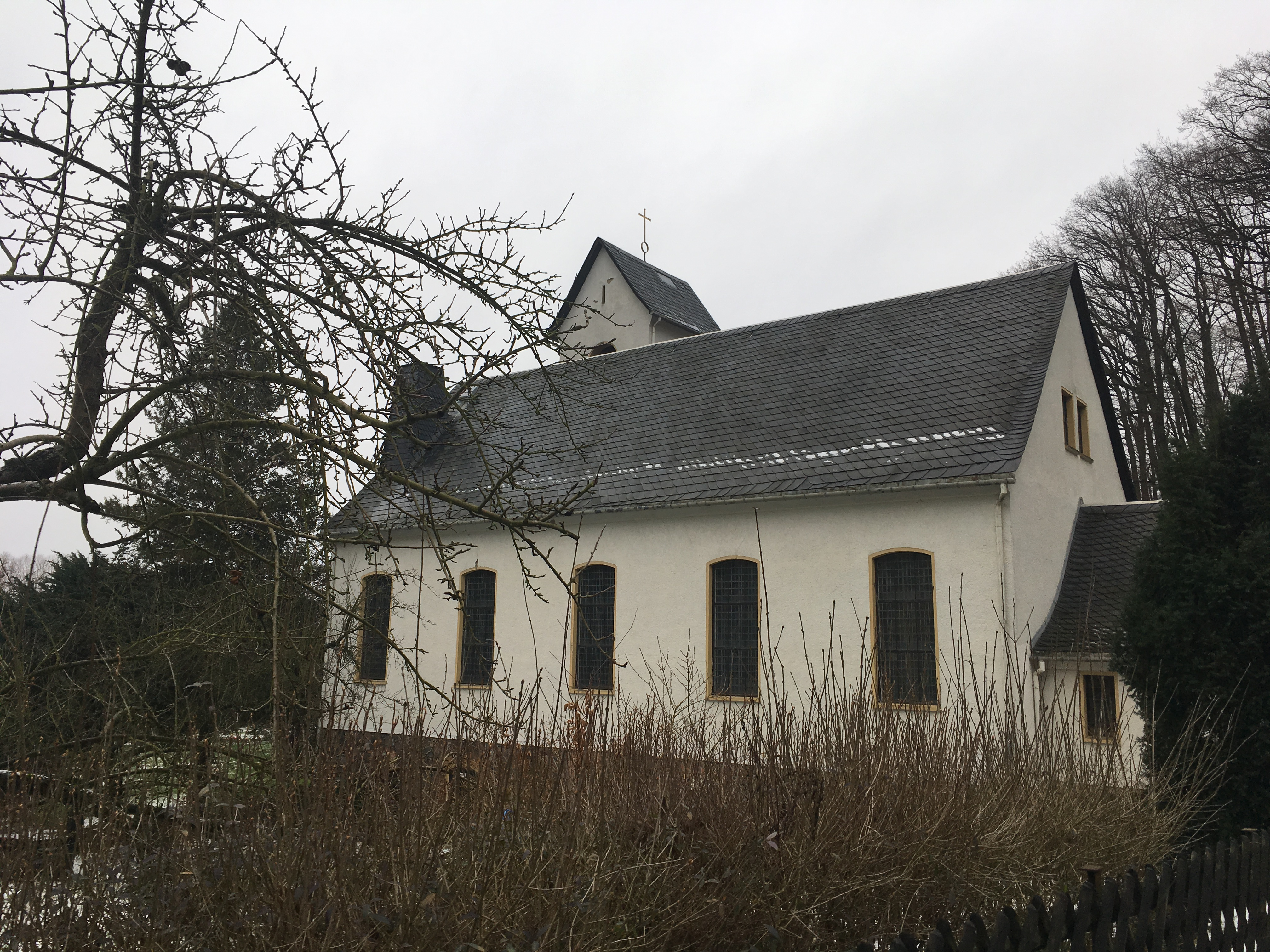 Die Malche-Kirche ist Teil eines denkmalgeschützten Ensembles der Schwestern- und Bruderschaft der Malche in Bad Freienwalde (Oder) in Brandenburg.